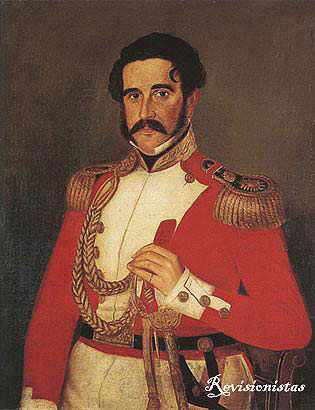 Joaquín María Ramiro (1800-1867) militar argentino que participara en las guerras por la independencia